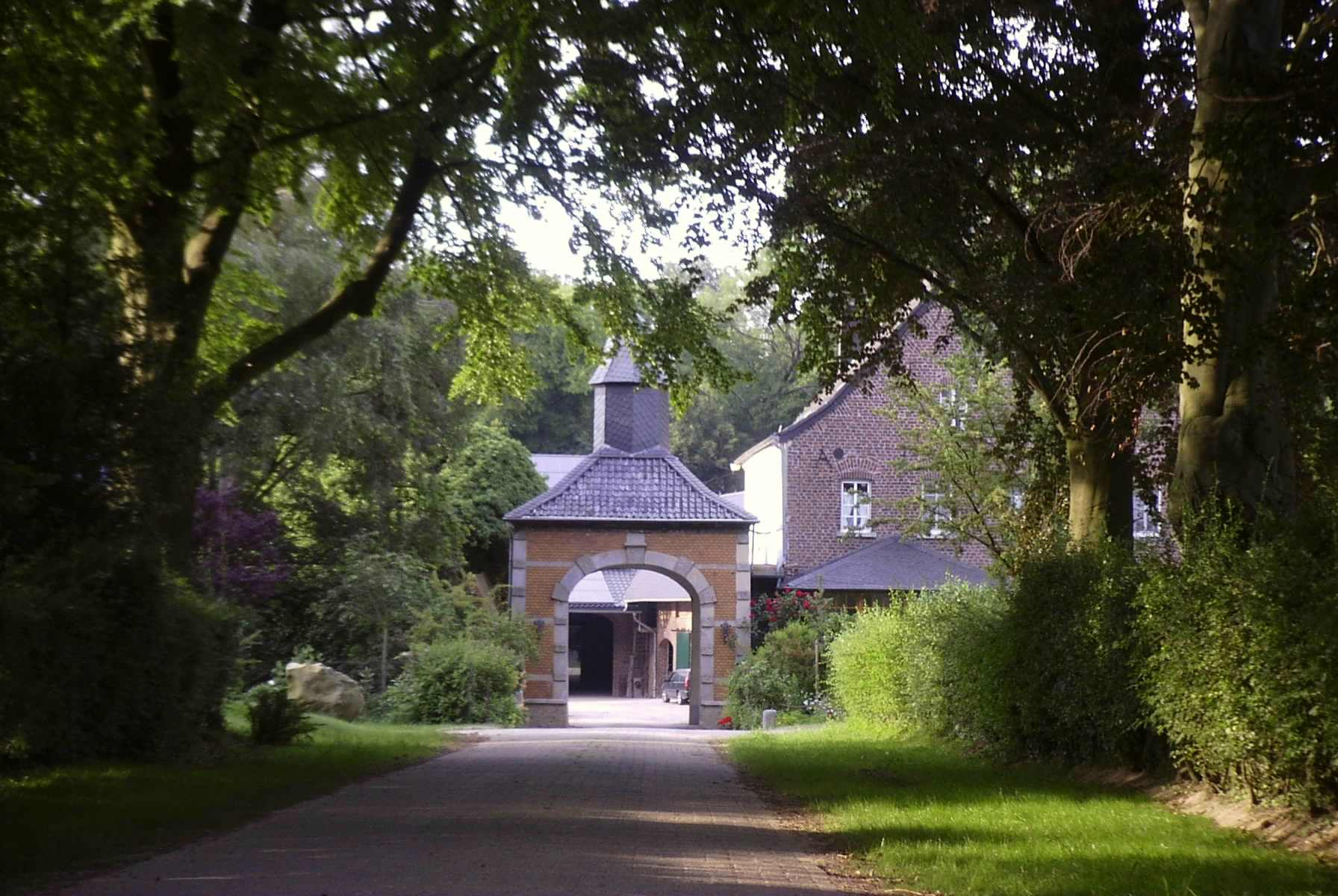 Eggerather Hof, Erkelenz-Holzweiler